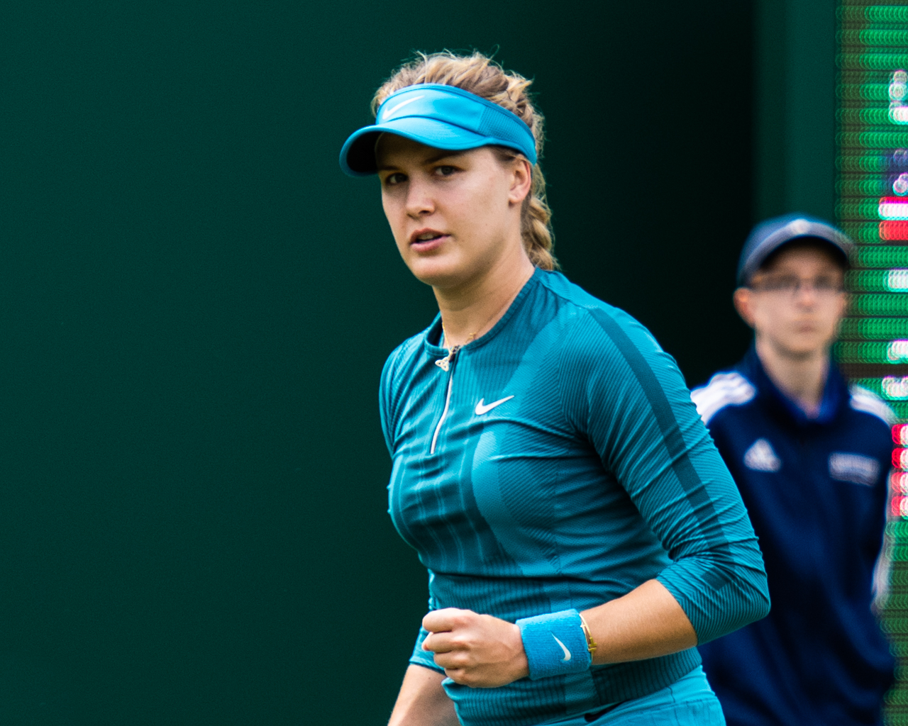 Genie Bouchard